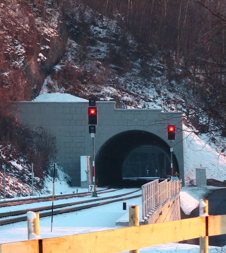 Durchsicht Staufner Eisenbahntunnel nach Renovierung 2016, Sicht vom Bahnhof aus